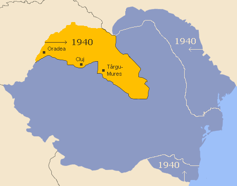 Partea de nord a Transilvaniei